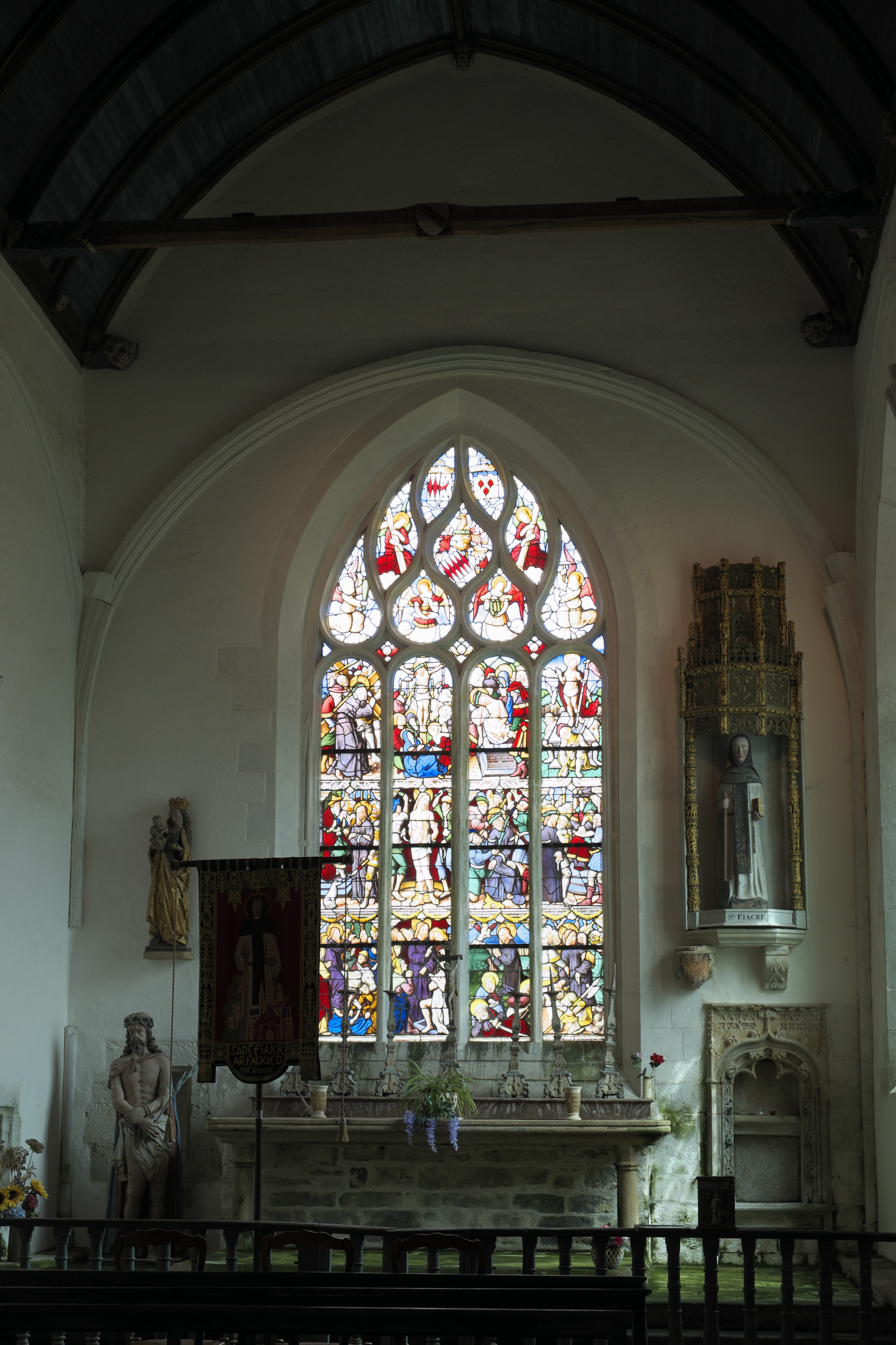 Kapelle Saint-Fiacre in Le Faouët im Département Morbihan (Region Bretagne/Frankreich), Innenraum